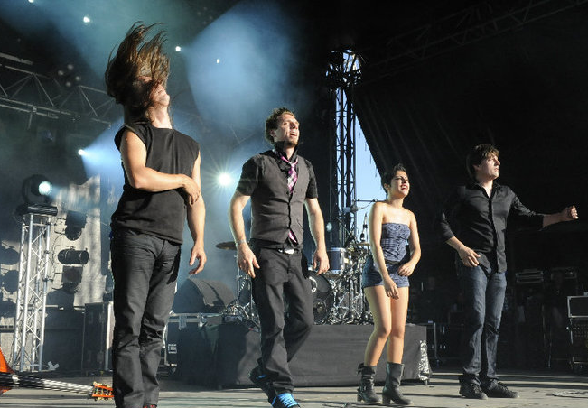 Carmen Maria Vega était en concert à Bobital pour l'édition 2010.